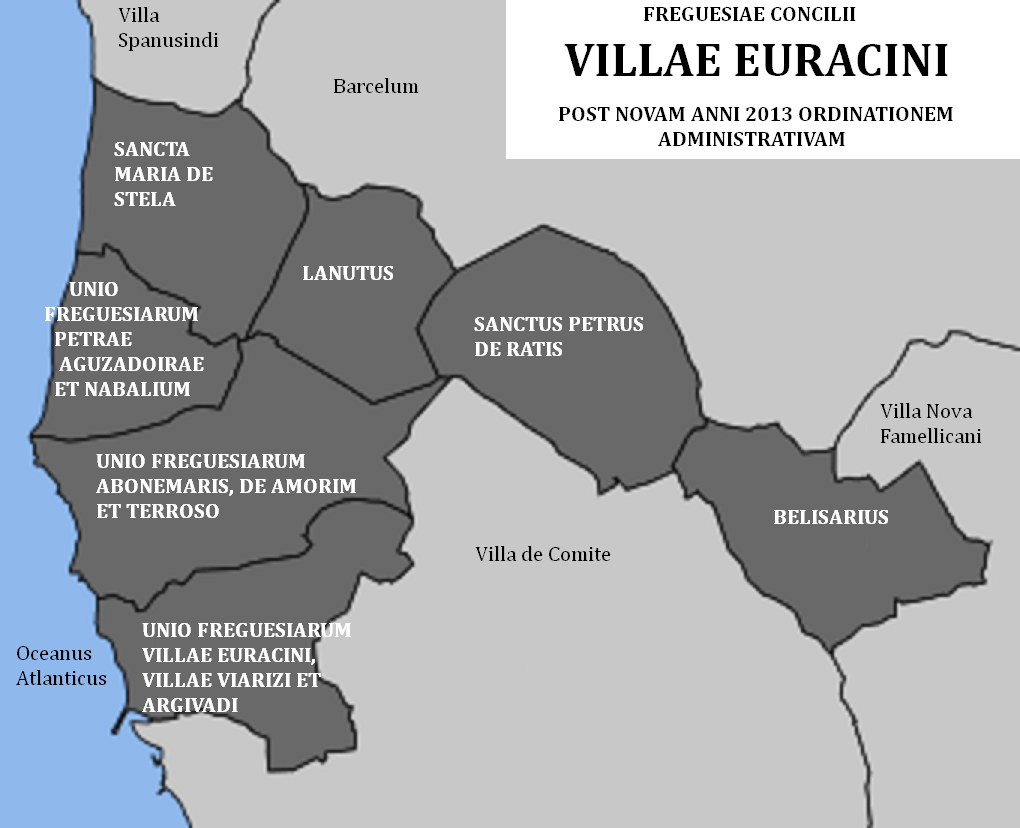 Freguesiae Concilii Villae Euracini post novam anni 2013 ordinationem administrativam